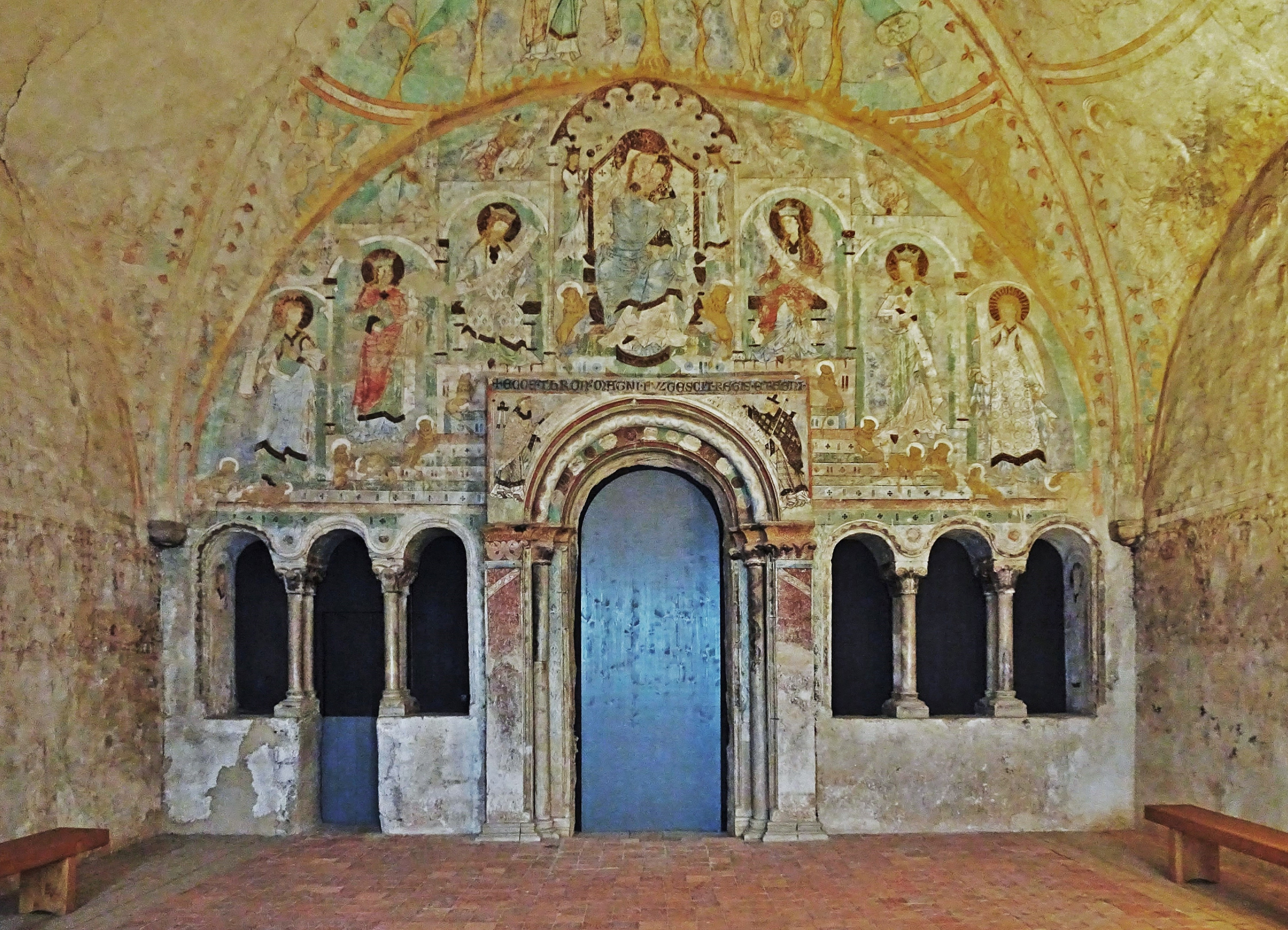 Die Ostwand der Bischofskapelle im Dom zu Gurk